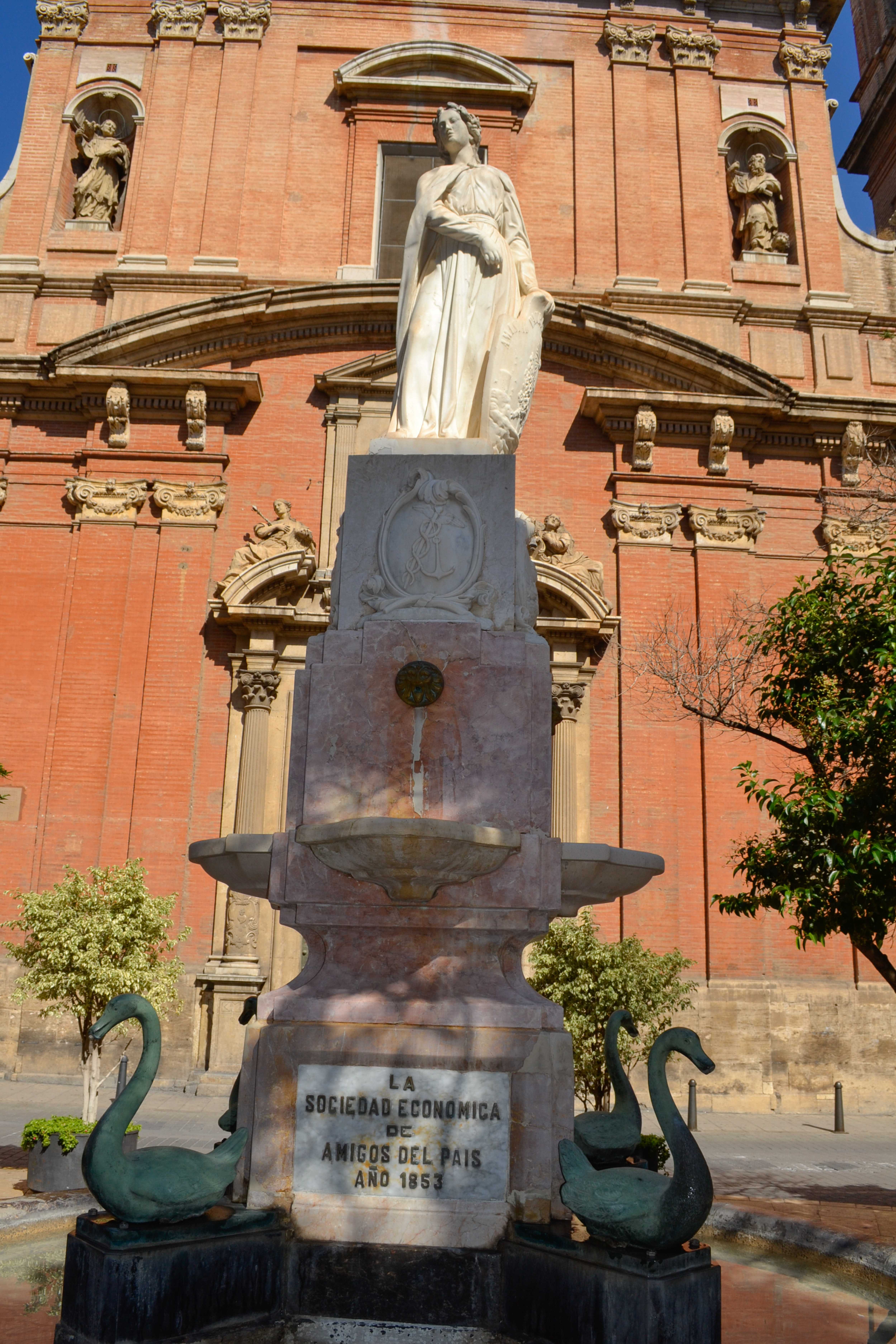 Font de la Plaça de Sant Vicent Ferrer, València.